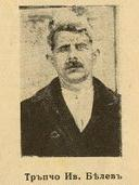 Тръпчо Белев.